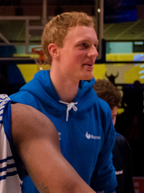 Buzzerbeater wat de winst opleverde tegen Donar Groningen